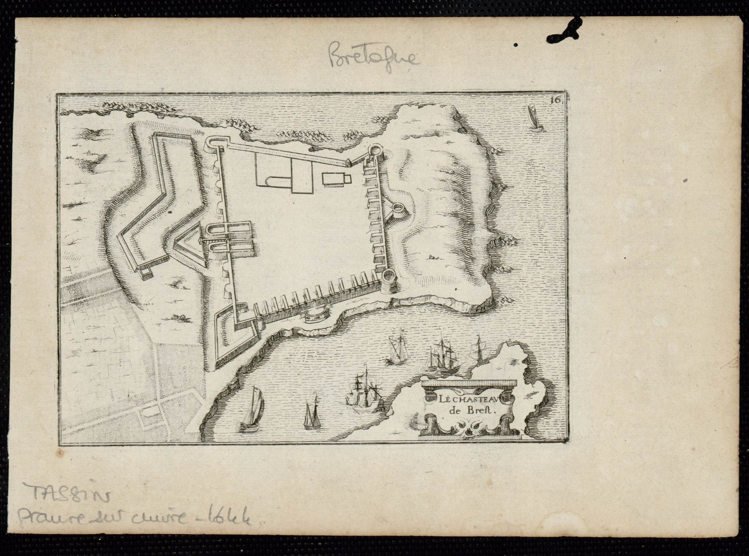 Plan cavalier du Château de Brest. Cette estampe fait partie d'une série de vues et plans de Brest par Tassin (Ce plan est le plus ancien plan connu représentant le château).